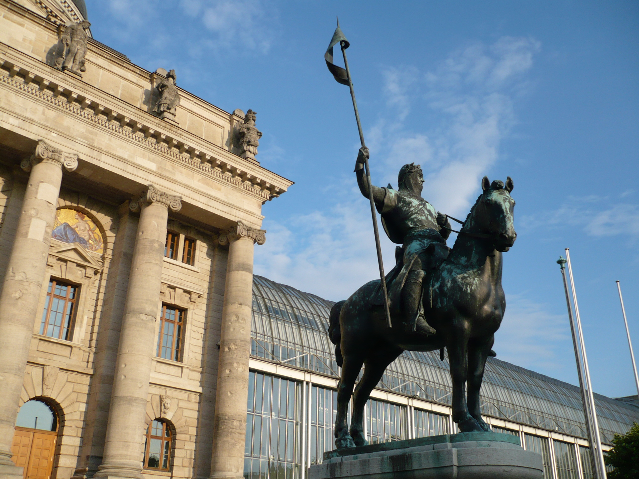 Otto I. der Rotkopf (* um 1117 wohl in Kelheim; † 11. Juli 1183 in Pfullendorf) aus dem Geschlecht der Wittelsbacher war der Sohn Ottos V. von Wittelsbach (als Pfalzgraf Otto V.; † 1156) und der Heilika von Lengenfeld. Seit 1156 war er als Otto VI. Pfalzgraf von Bayern und von 1180 bis zu seinem Tod Herzog von Bayern. Mit seinem Aufstieg zum Herzog begann die Herrschaft der Wittelsbacher über Bayern, die erst im Jahre 1918 endete. Denkmal an der Bayrischen Staatskanzlei.